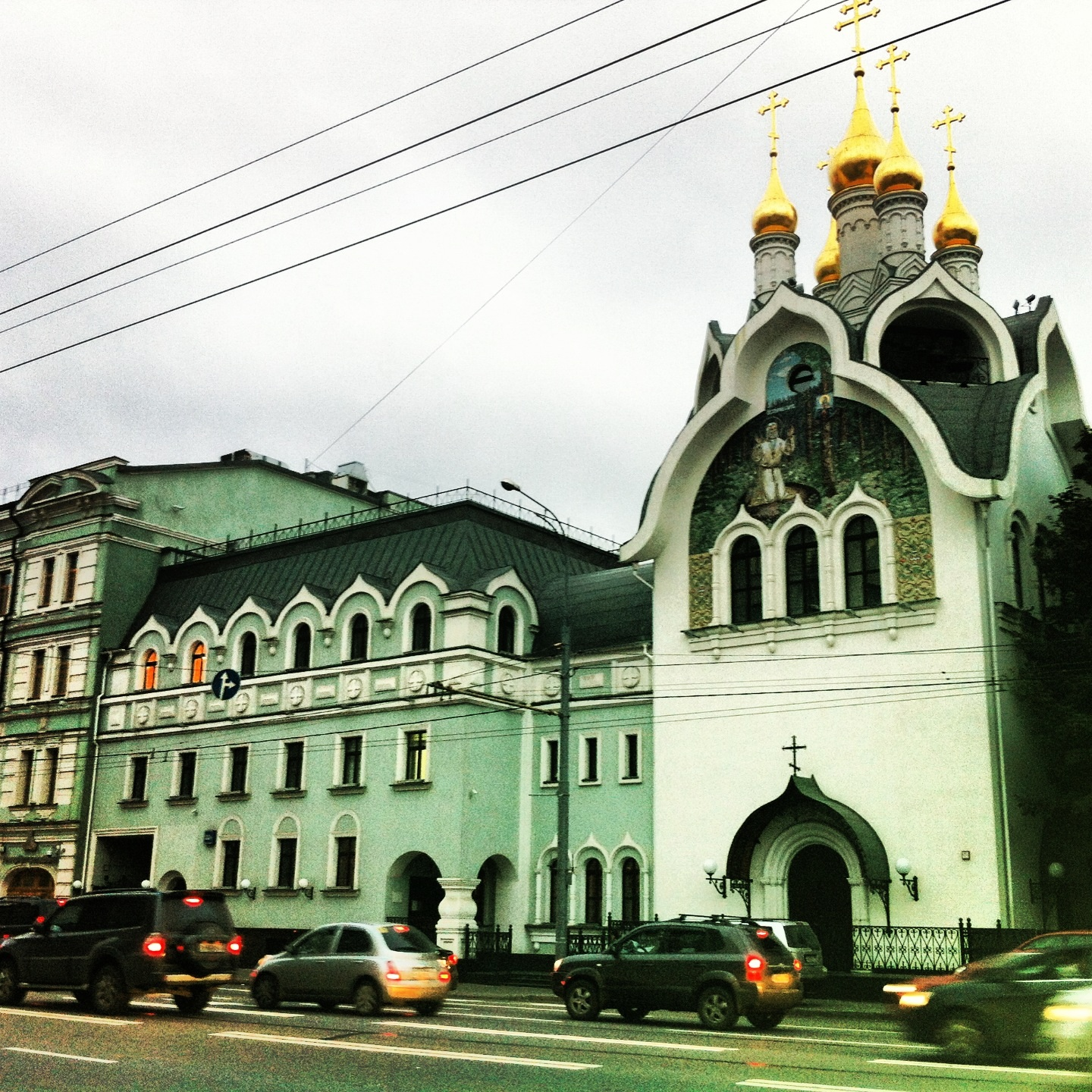 Москва, Мира проспект, 24 - современные постройки